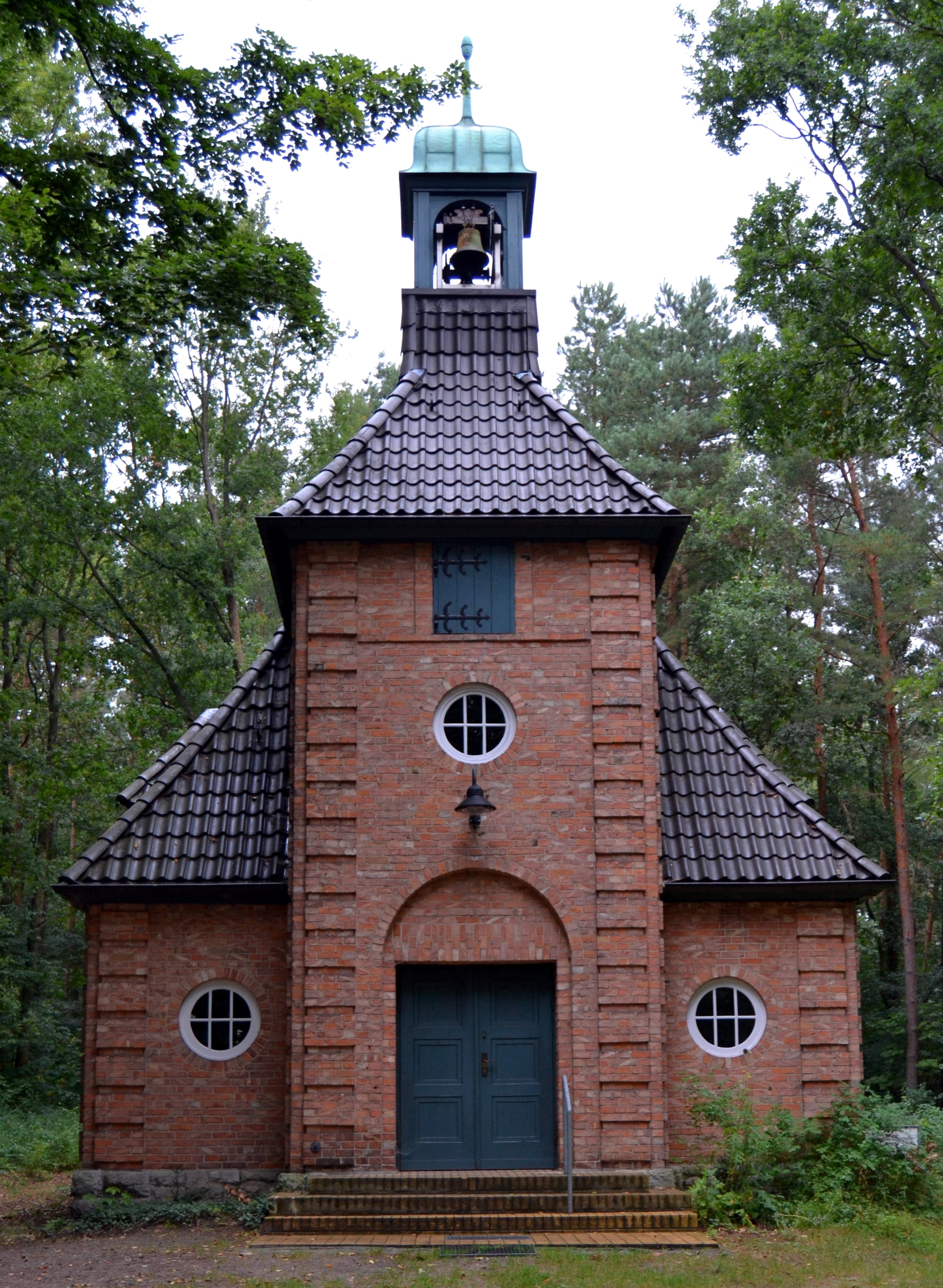 1910 von Jürgensen & Bachmann erbaute Waldkapelle „Zum anklopfenden Christus“ in Berlin-Rahnsdorf